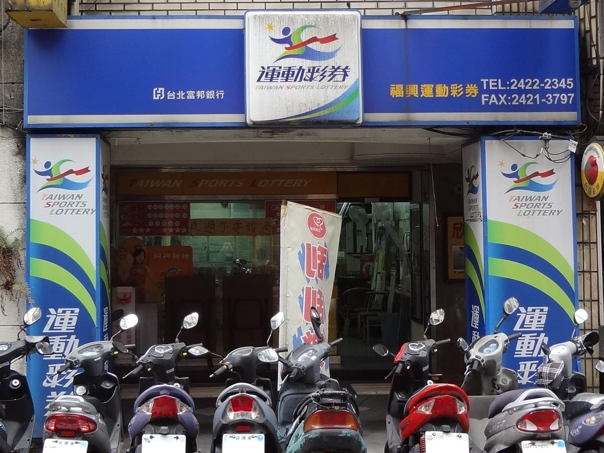 福興運動彩券行，地址：基隆市仁愛區孝三路82號1樓。